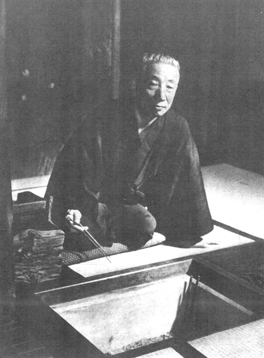 読売新聞社『家庭よみうり』401号（1954年）より小島政二郎